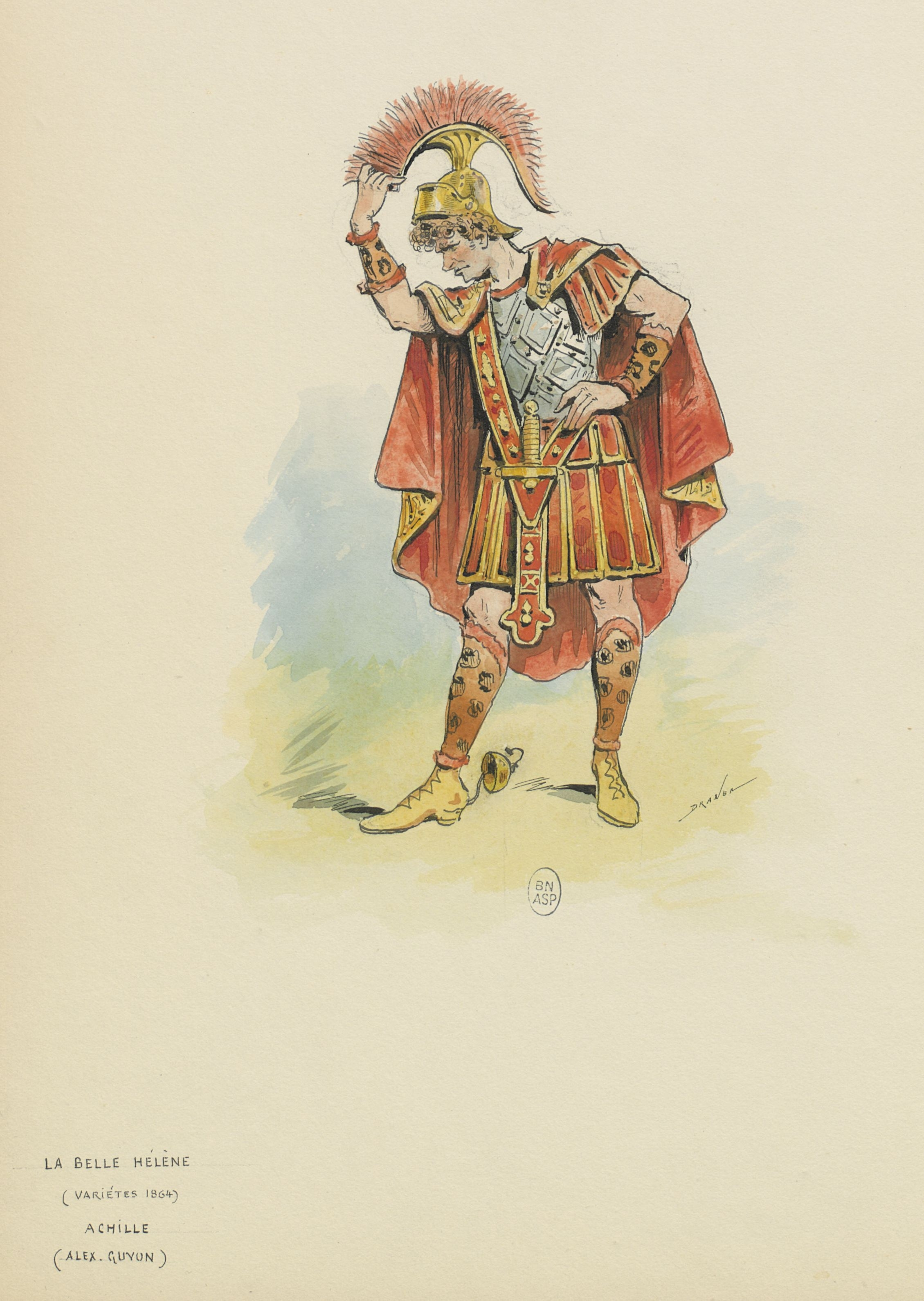 [La belle Hélène, opéra-bouffe de Meilhac, Halévy, Offenbach : Guyon (Achille) : dessin / de Draner]